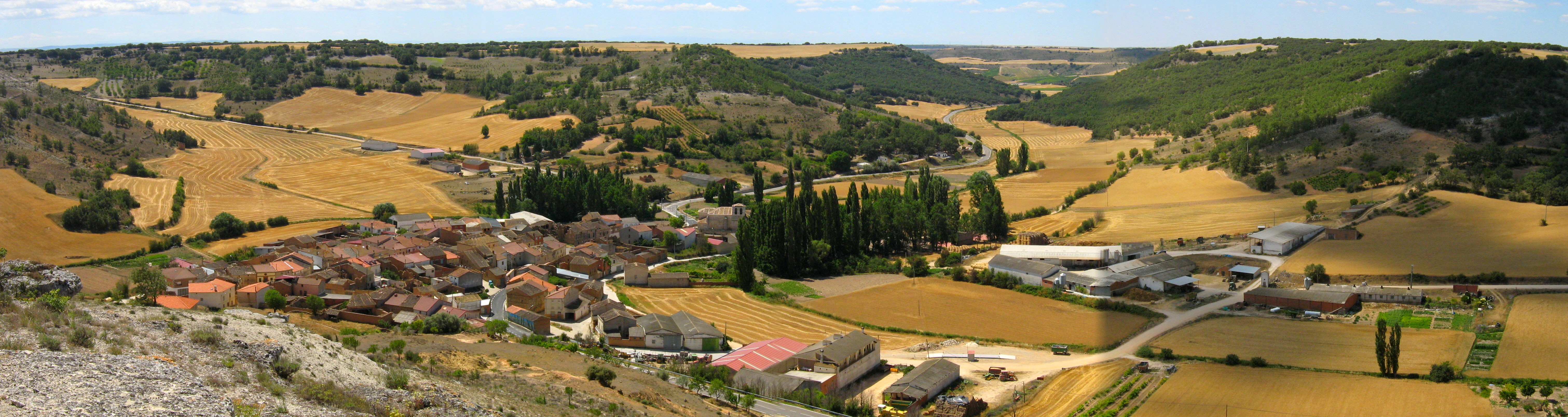 Corrales de Duero, Valle del Cuco, Valladolid. Vista desde el Pico San Antonio.